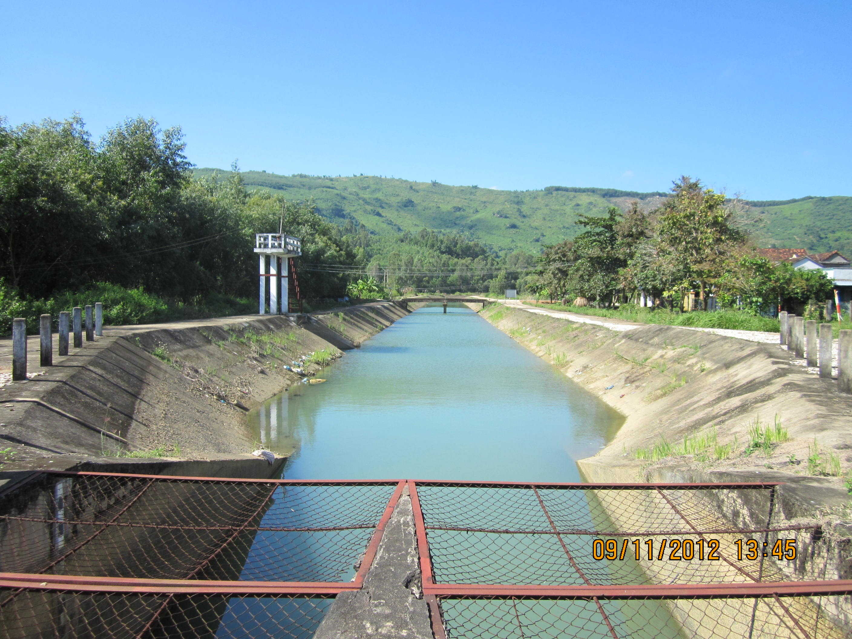 Xi phông Sông Vệ (Nghĩa Hành-Quảng Ngãi)